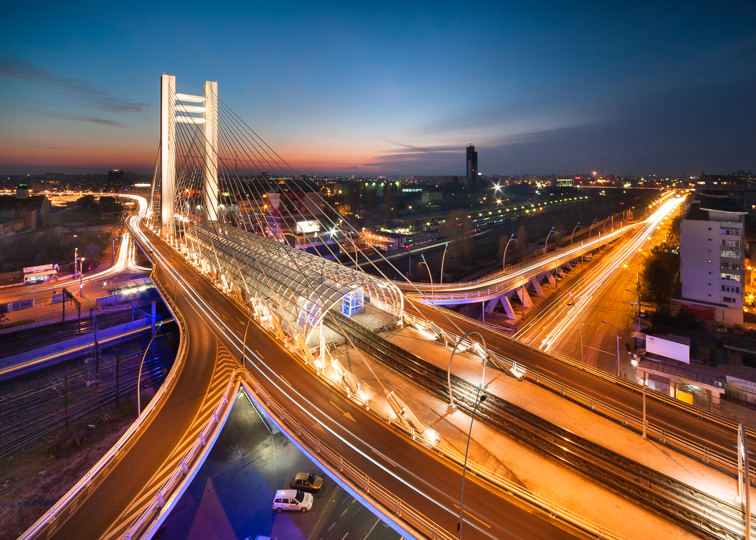 Pasajul Basarab - Noaptea